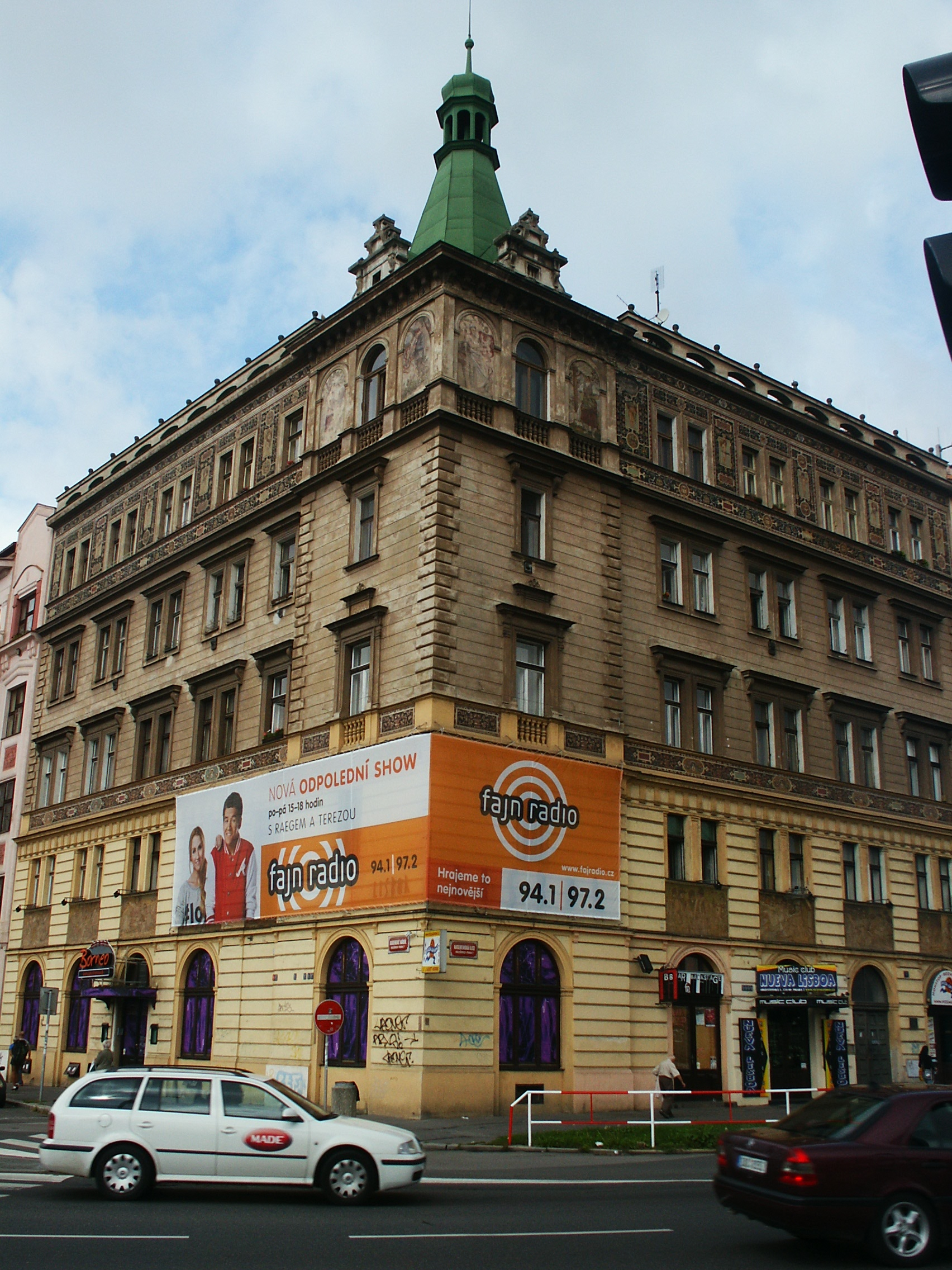 Dům Argentinská 1, Praha 7-Holešovice, Argentinská 702/1, Bubenské nábřeží 702/12